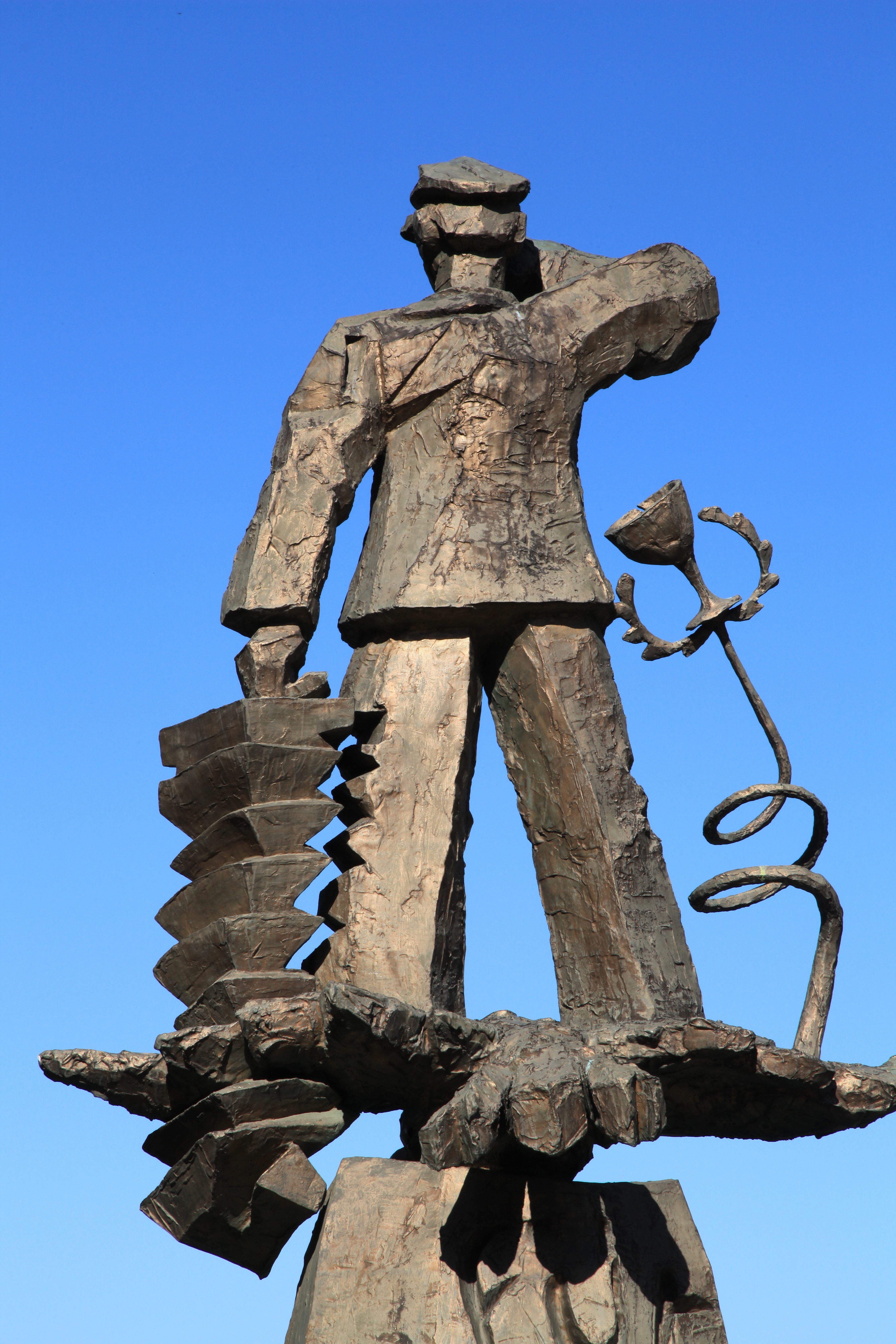 Hans-Albers-Statue von Jörg Immendorff auf dem Platz der Medien (Uecker-Platz) in Düsseldorf. Das hier ist das Original von 1986, das neun Jahre lang auf dem Hans-Albers-Platz in Hamburg stand. Dort steht nun eine Kopie.